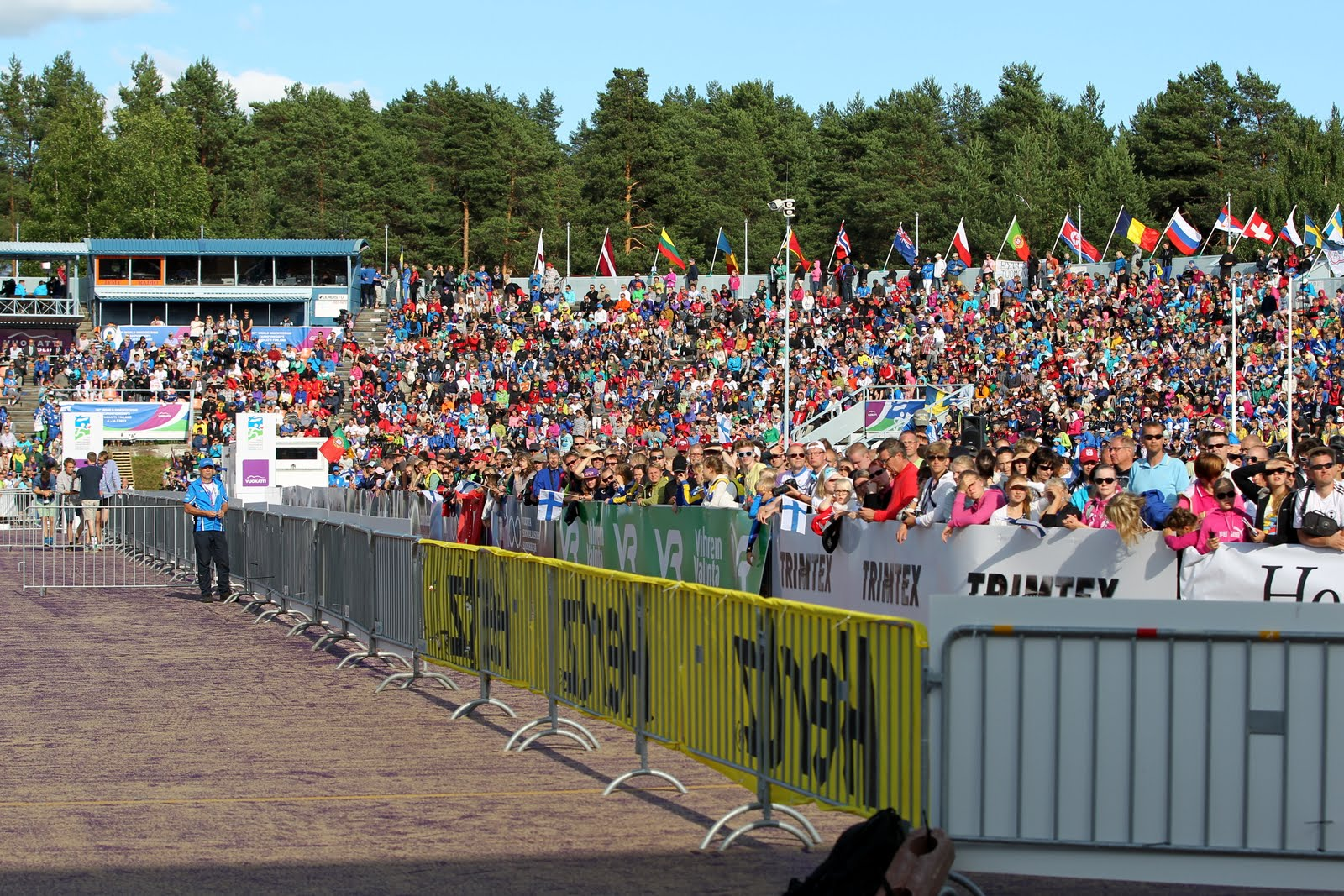 Sprint final 2013, WOC 2013, 36